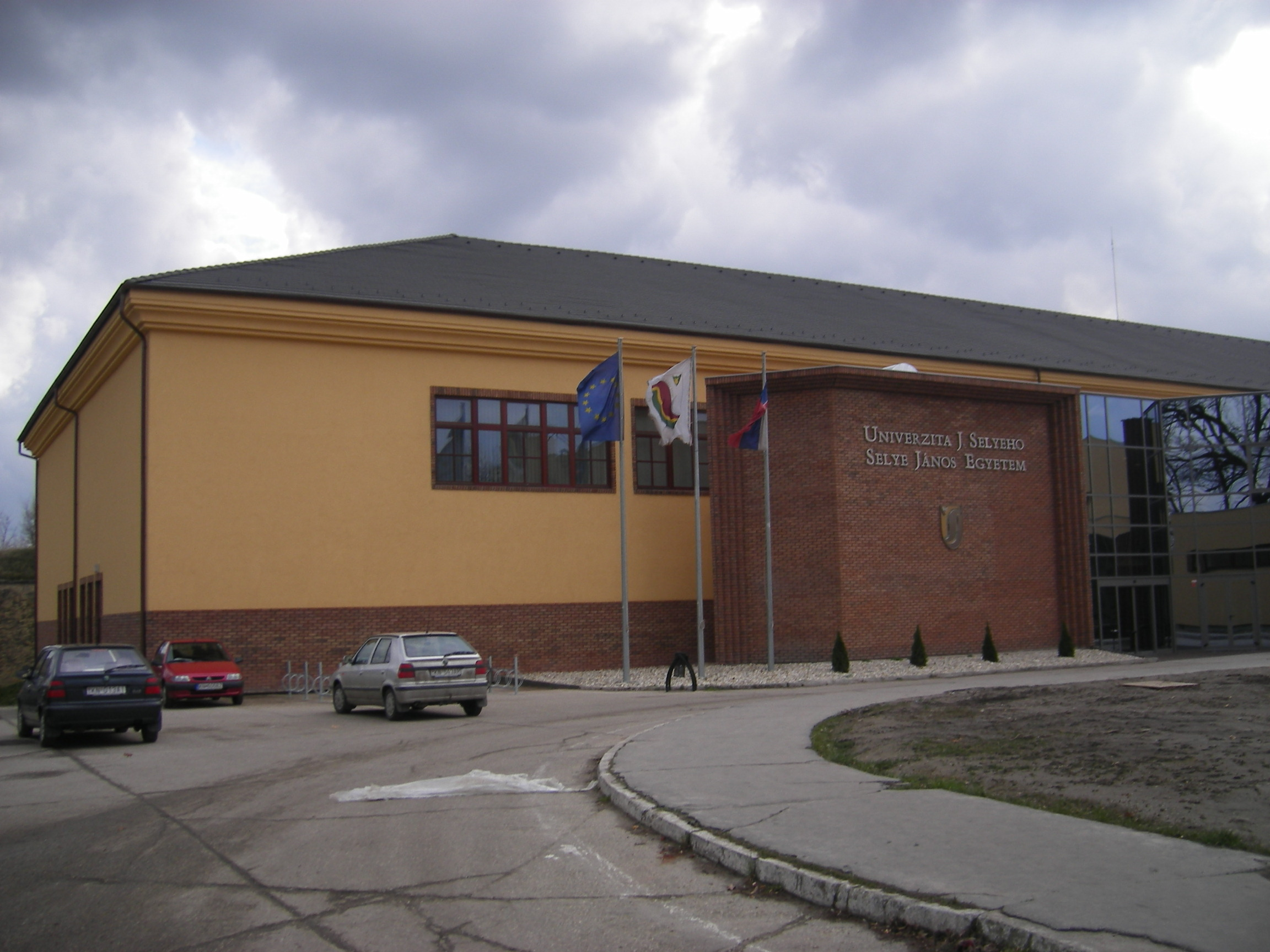 Komárom - a Selye János Egyetem 2006-ban átadott új épülete Komárno - Univerzita Hansa Selyeho, nová budova otvorená v r. 2006